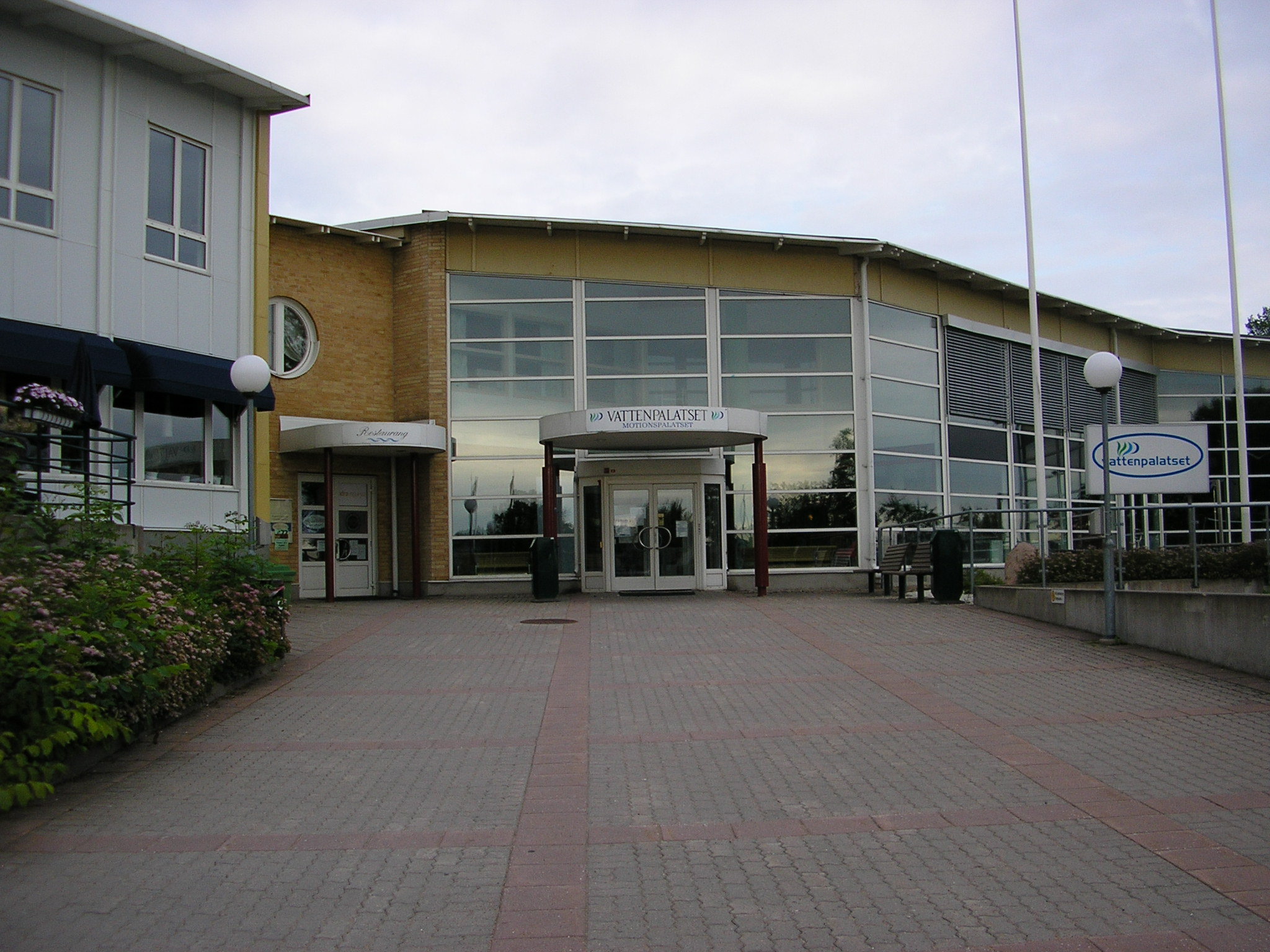 Ingången till Vattenpalatset, Vänersborg.